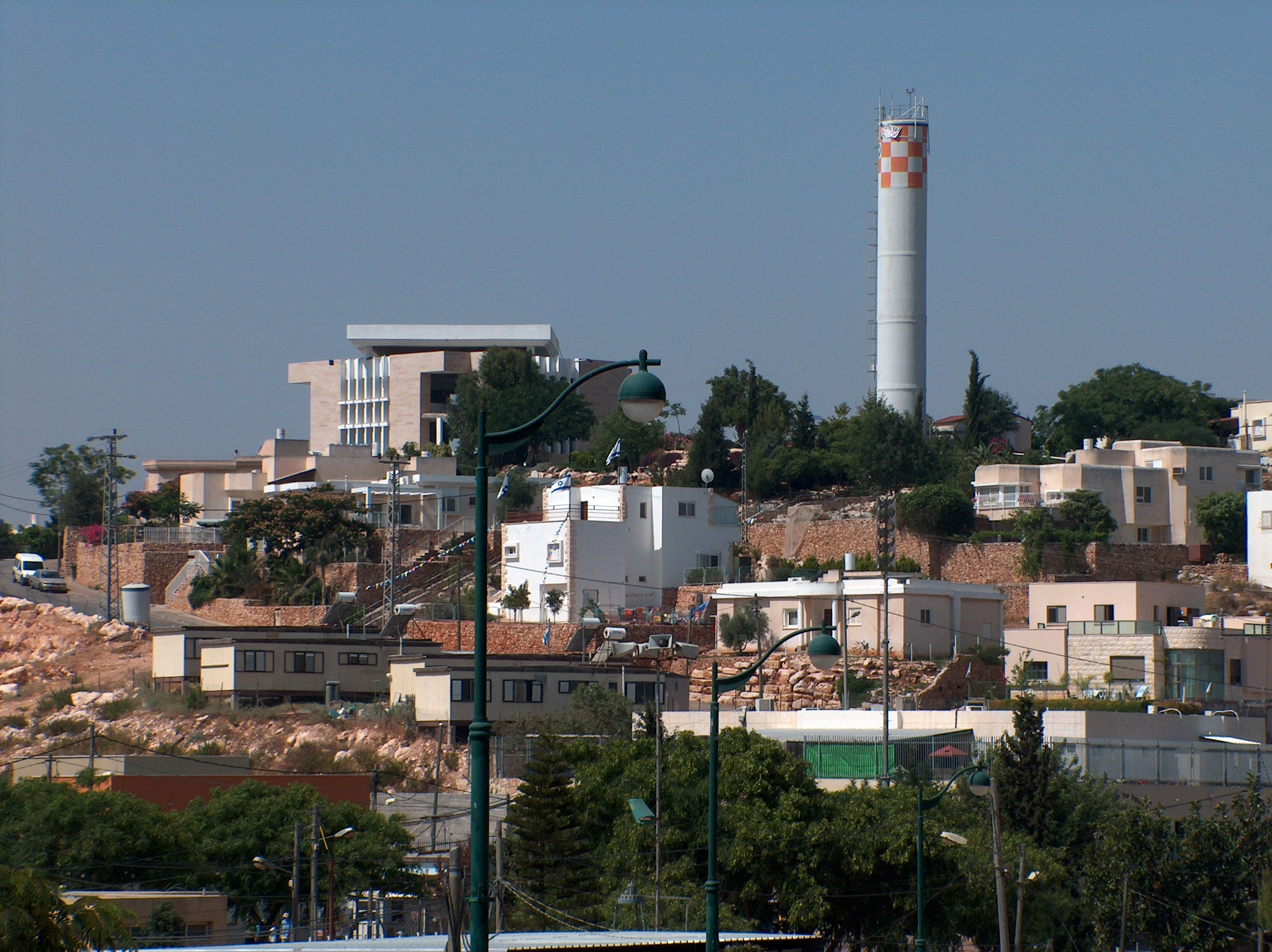 מראה כללי של היישוב he:פדואל. צילום: מיכאלי, 7/2005